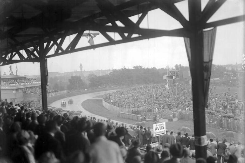 Das internationale Automobil-Rennen über 400km. "Um den grossen Preis von Deutschland" Blick von den Tribünen auf das Rennen "Um den grossen Preis von Deutschland" auf der Avus.